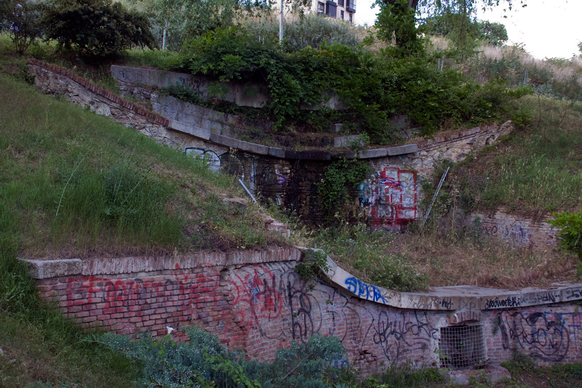 Corresponde a los restos de la canalización del vertedero de la almenara del Obispo del Canal Bajo de Madrid